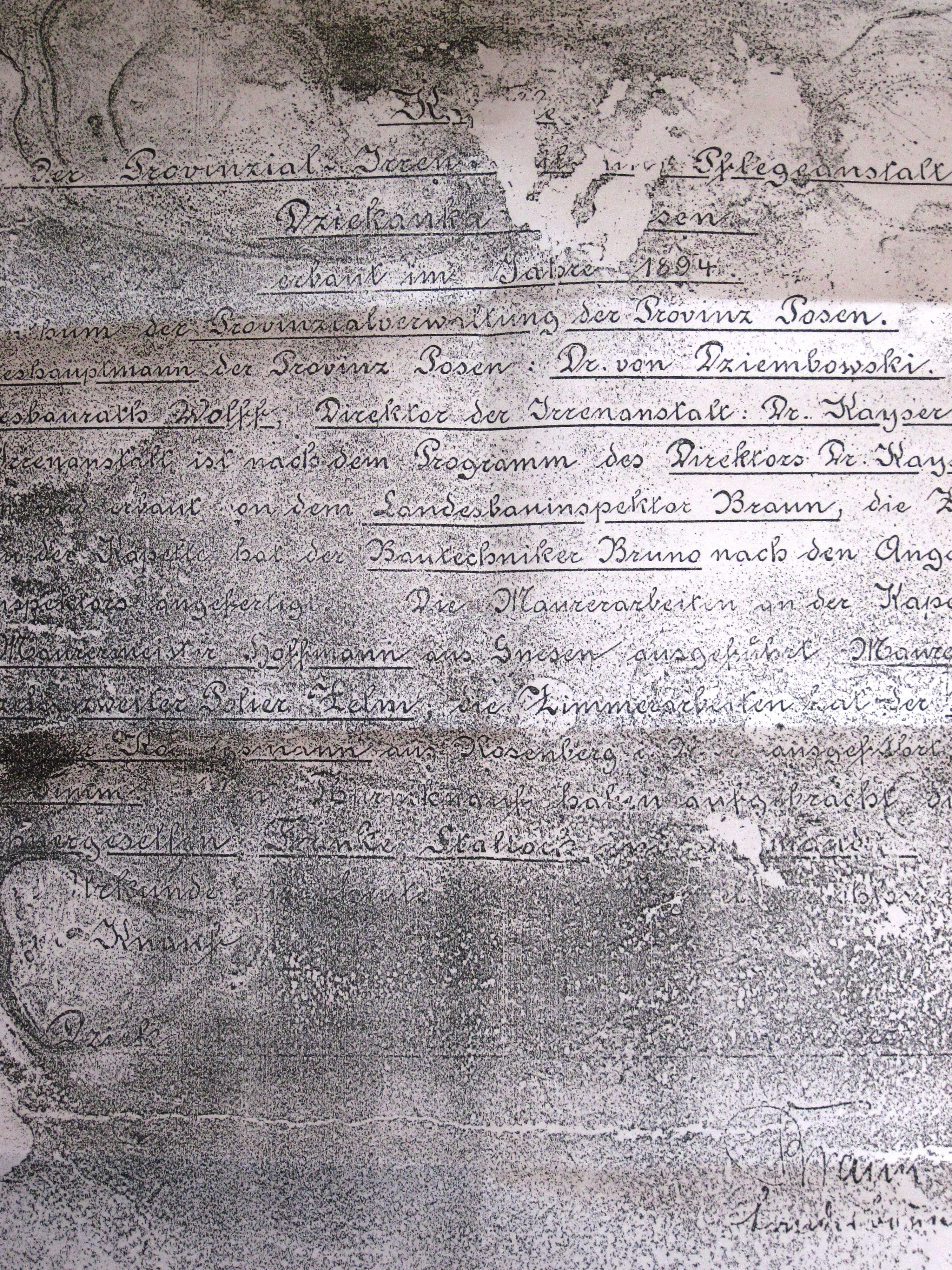 Kopia dokumentu znalezionego w kopule wieży kościoła bł. Michała Kozala w Gnieźnie. Dokument z 1894, odnaleziony i oddany do Muzeum Archidiecezjalnego w Gnieźnie 1 grudnia 2000 roku. Tłumaczenie: Kaplica Prowincjonalnego Szpiala dla Chorych Psychicznie "Dziekanka-Gniezno" Wybudowana w roku 1894. (...) zarządu Prowincji Poznańskiej. Naczelny prezes Prowincji Poznańskiej: Dr von Dziembowski, radca prowincjonalny Wolff. Dyrektor szpitala: dr Kayser. Szpital dla obłąkanych został zbudowany zgodnie z planem dyrektora dr Kaysera, zaprojektowany i zbudowany przez Inspektora Budowlanego Brauna, projekt kaplicy wykonał technik budowlany Bruno, zgodnie z wytycznymi Inspektora Budowlanego. Prace murarskie wykonali: mistrz murarski Hoffman z Gniezna i majster Kinzell, drugim majstrem był Zelm. Roboty ciesielskie wykonywali przedsiębiorca budowlany Koch(...)smann z Rosenbergu i podmajster Timm. (...) Dokument został dzisiaj umieszczony w kopule wieży. Dziekanka - Gniezno Braun Krajowy Inspektor Budowlany